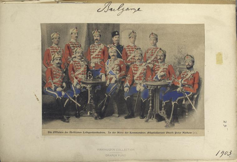 Bulgarian Life Guard Cavalry Squadron Officers, 1903, The Vinkhuijzen collection, New York Public Library. (Bulgarije. Die Offiziere der fürstlichen Leibgardeeskadron. In der Mitte der Kommandeur, flügeladjutant Oberst Peter Markow. (1903). )